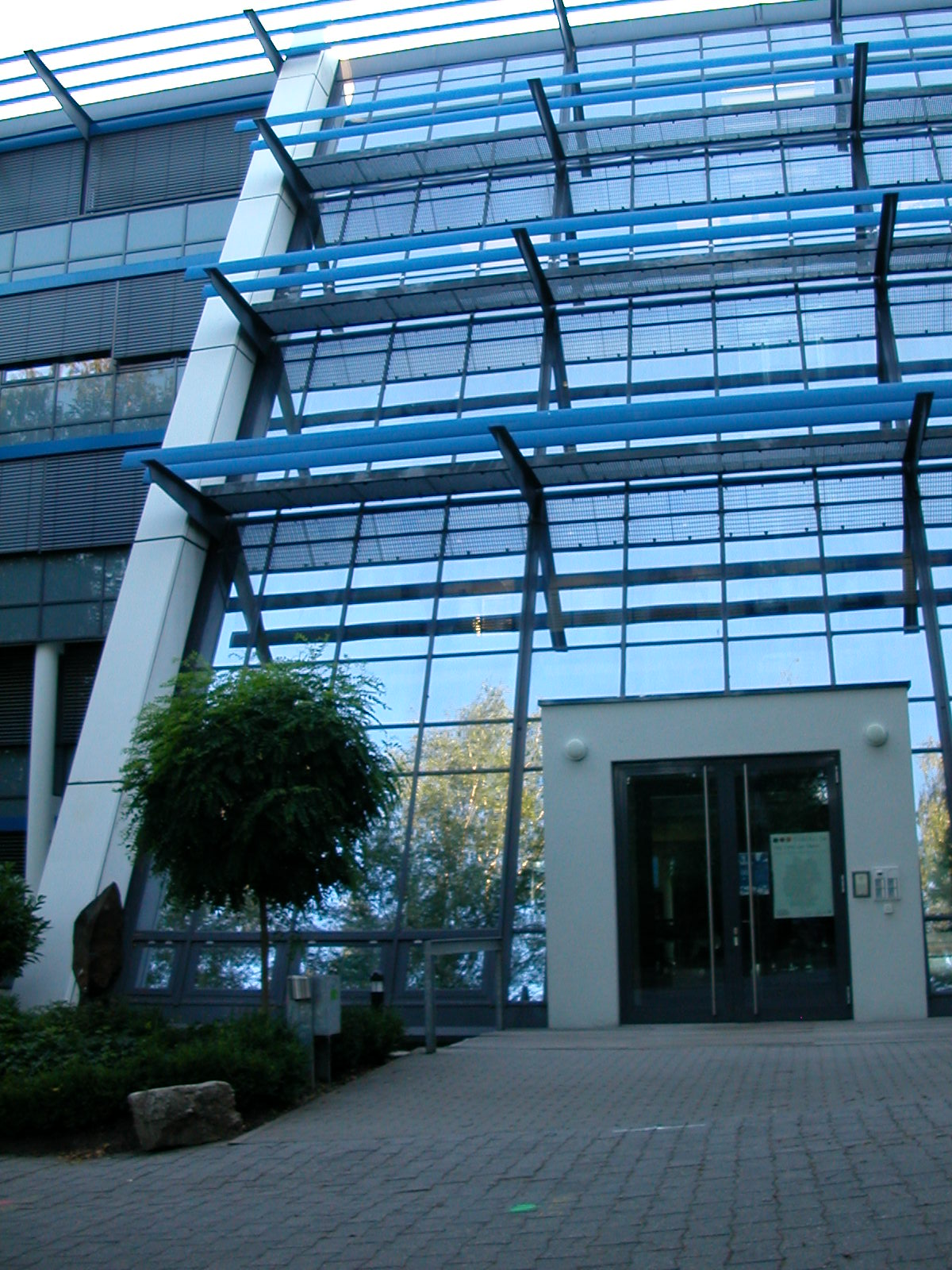 The Building of the “Deutsches Forschungszentrum für Künstliche Intelligenz Saarbrücken”